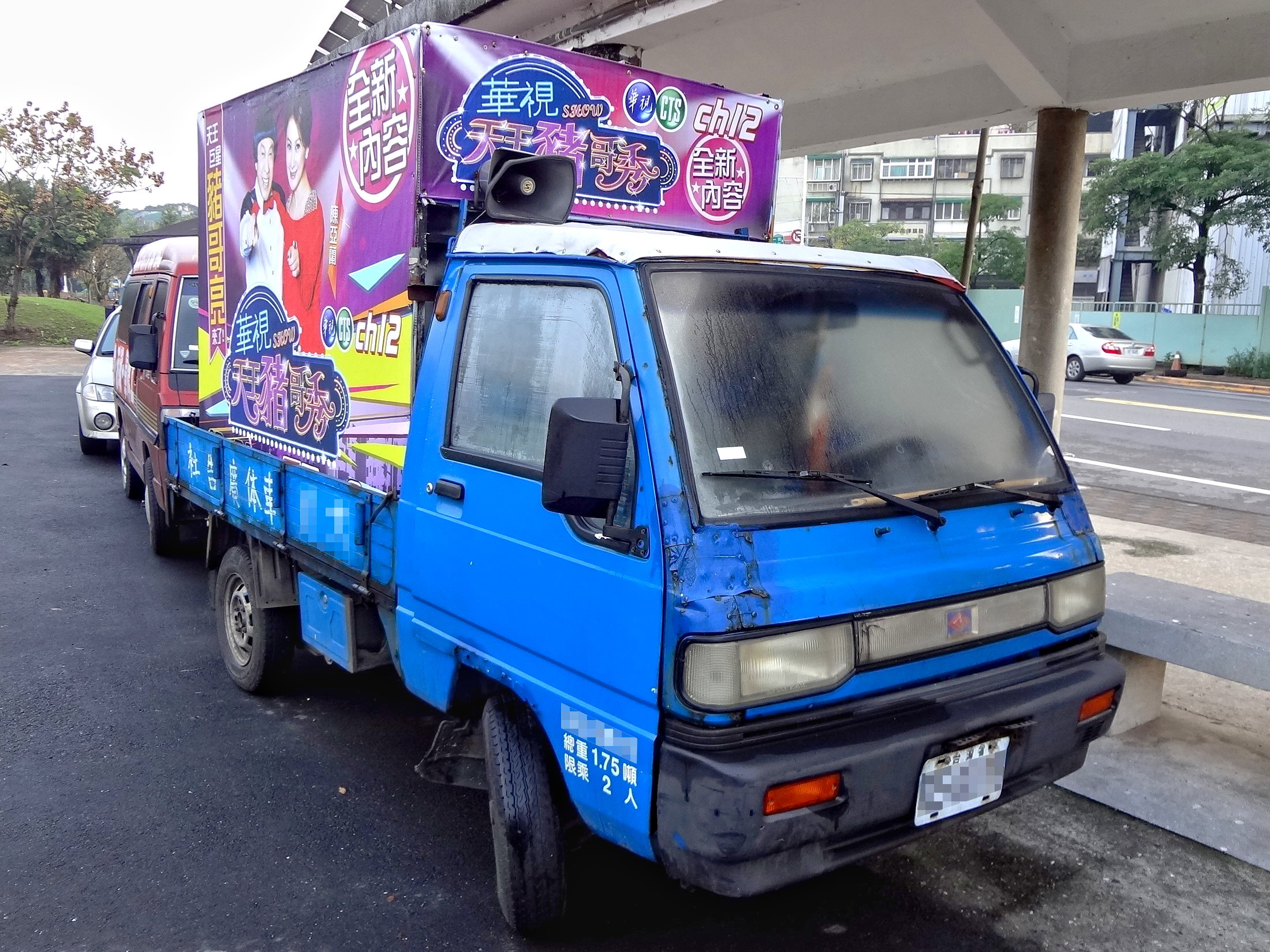 中華電視公司委外行駛的《華視天王豬哥秀》宣傳車，使用中華威利1100DX小貨車。